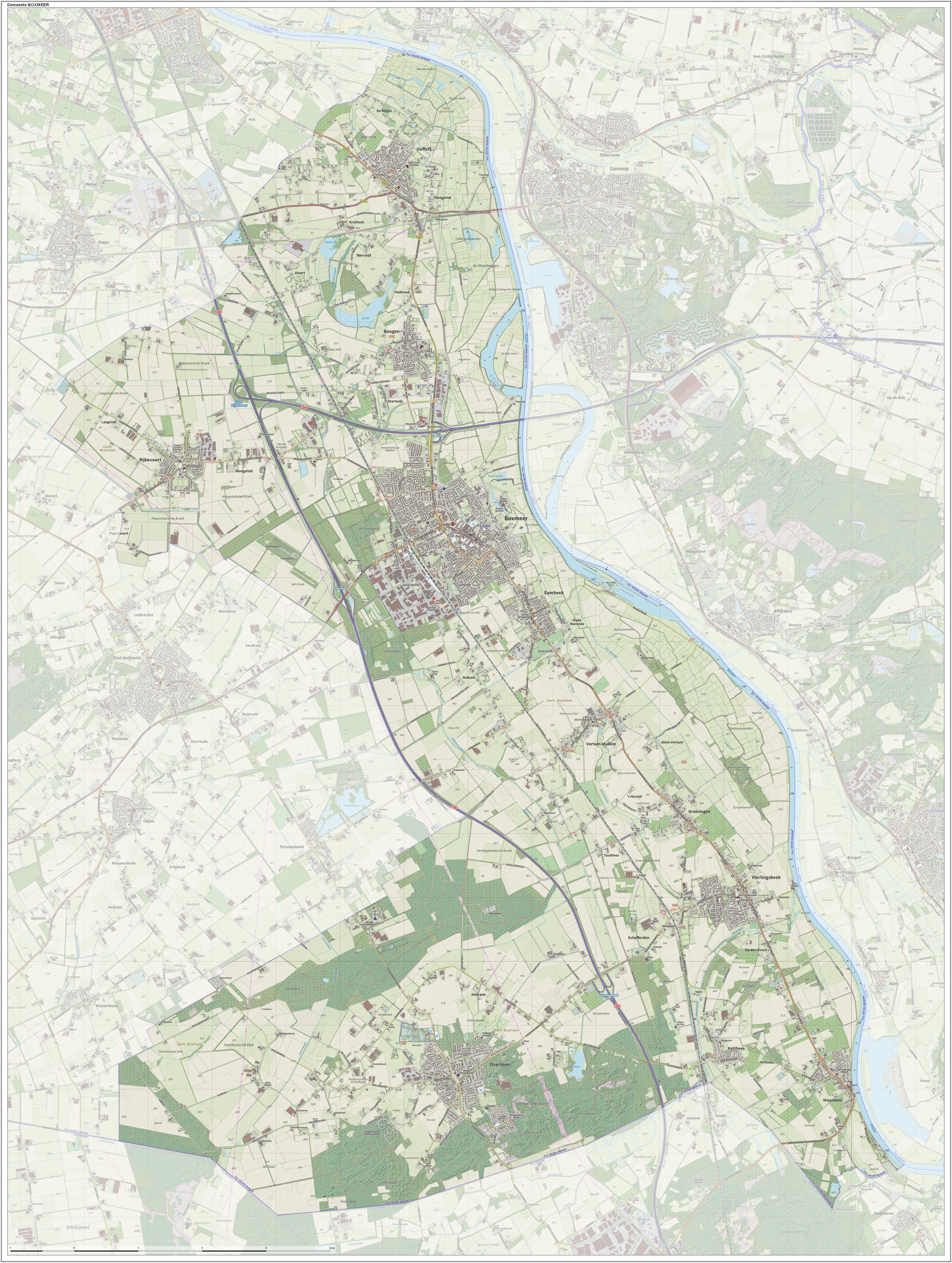 Topografische gemeentekaart. Resolutie: 400 pixels/km. Kaartbeeld samengesteld uit de open geodata van de Top10NL en Top25namen (Kadaster), Creative Commons-BY licentie. Gebouwvlakken uit open geodata BAG extract. Wegen uit de OpenStreetMap, OpenStreetMap community. Reliëfschaduw uit de Actuele Hoogtekaart AHN2. Samenstelling en kleurenschema: Jan-Willem van Aalst, met QGIS. Zie ook de Legenda.